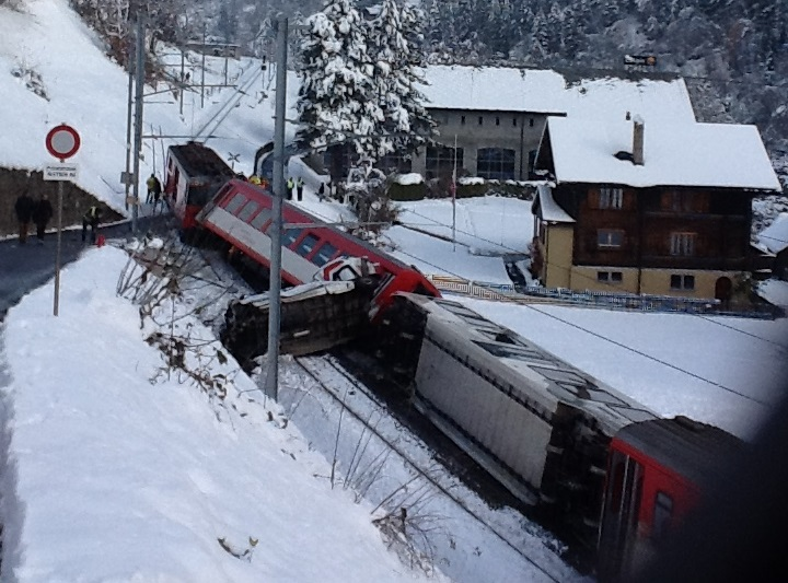 Am 25. November 2013 fuhr in Regionalzug der Matterhorn–Gotthard-Bahn (MGB) von Fiesch in Richtung Brig und kollidierte mit einem Lieferwagen auf einem nicht überwachten Bahnübergang. Der Lieferwagen wurde von der Zugskomposition mitgerissen. Die drei Personenwagen und die Lokomotive wurden aus den Geleisen gehoben und der mittlere Wagen kippte auf die Seite. Zwei Personen wurden mittelschwer verletzt und neun Reisende zogen sich leichte Verletzungen zu. Der Lenker des Lieferwagens sowie der Lokführer wurden durch den Unfall nicht verletzt.